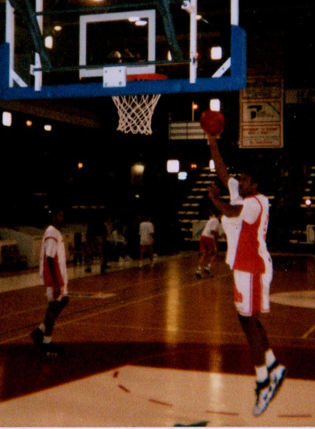 Charles Pittman (Elan Chalon) à l'échaufement avant un match de Pro A en novembre 1996.